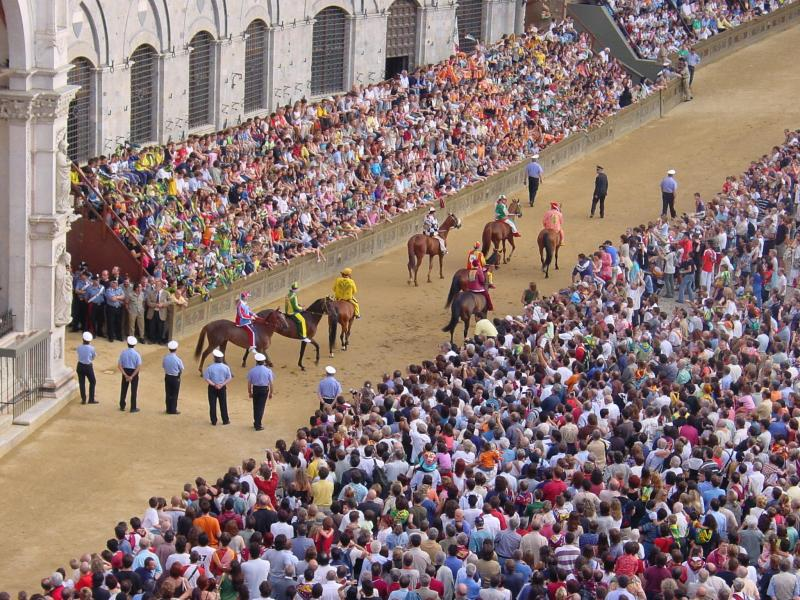 De Palio, ofwel il Palio (het vaandel), is een paardenrace die sinds 1287 gehouden wordt in het centrum van Siena, in de Italiaanse regio Toscane. Foto door mijzelf gemaakt.